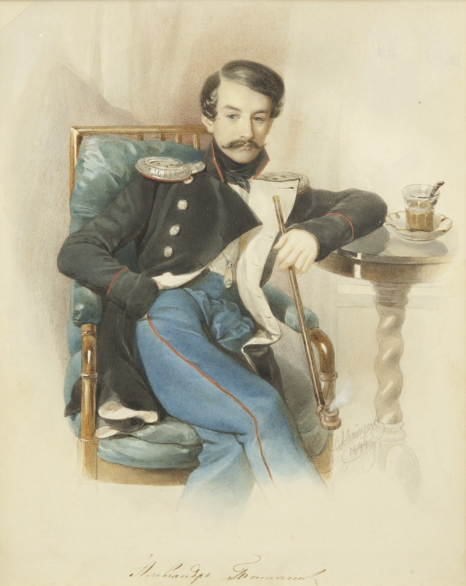 Тимашев Александр Егорович (1818 — 1893)